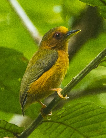 Sasia abnormis, Temminck, 1825